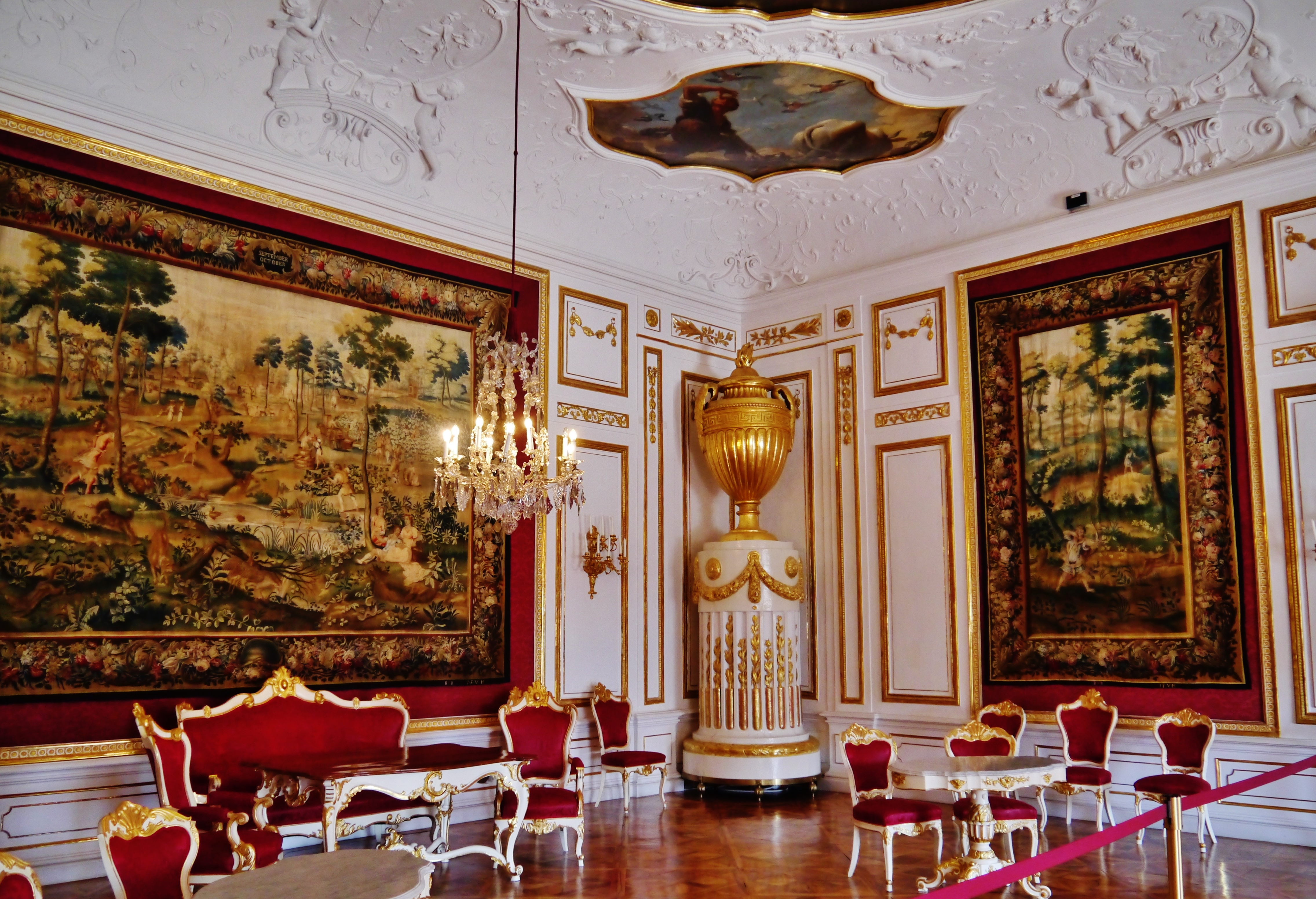 Innenräume der Residenz, Salzburg, Salzburg, Österreichen